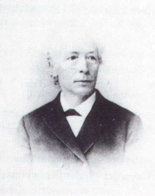 J. G. van Niftrik (1833-1910), Ingenieur